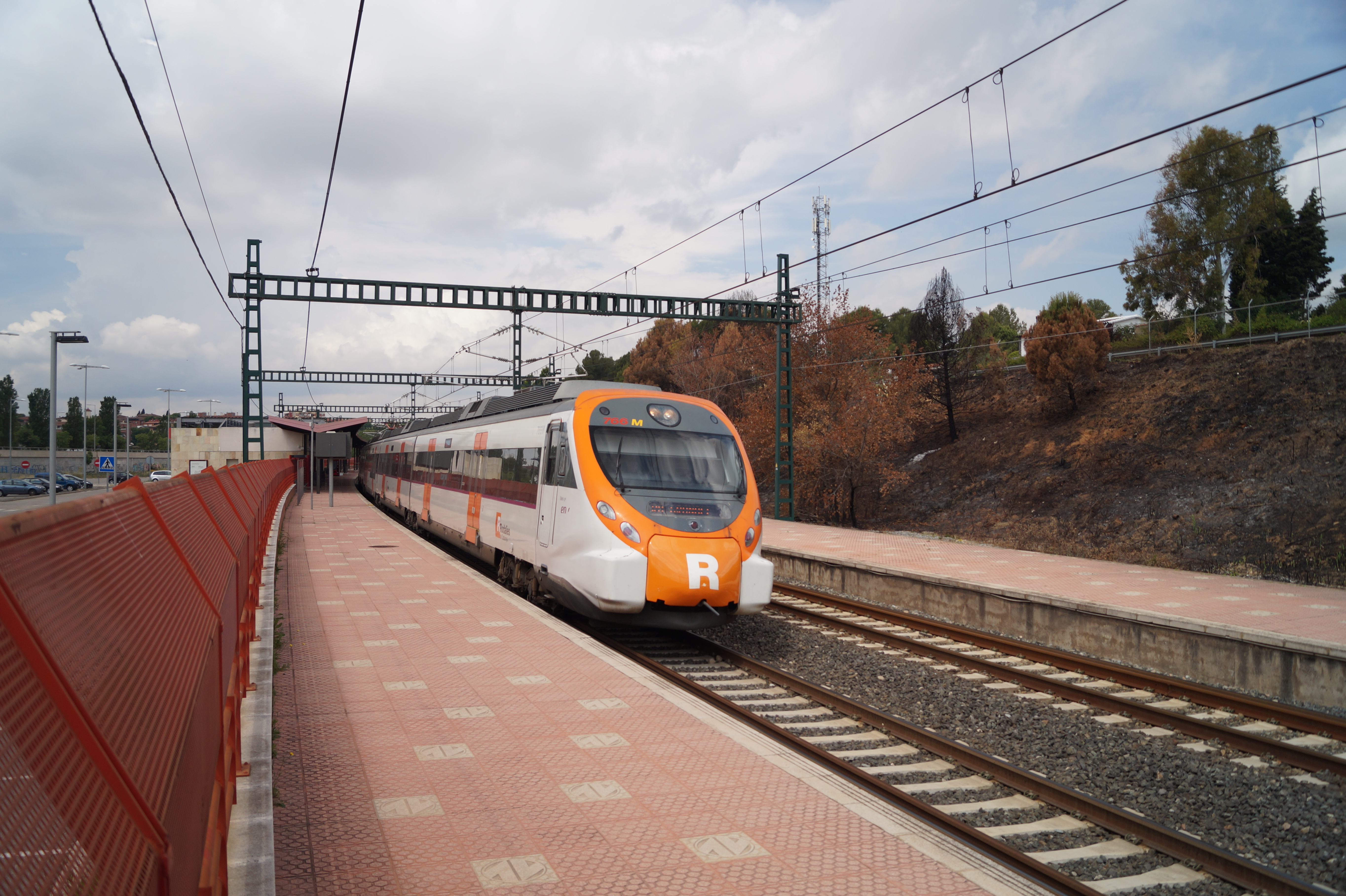 Triebzug 465 766 am Haltepunkt Sant Cugat del Vallès